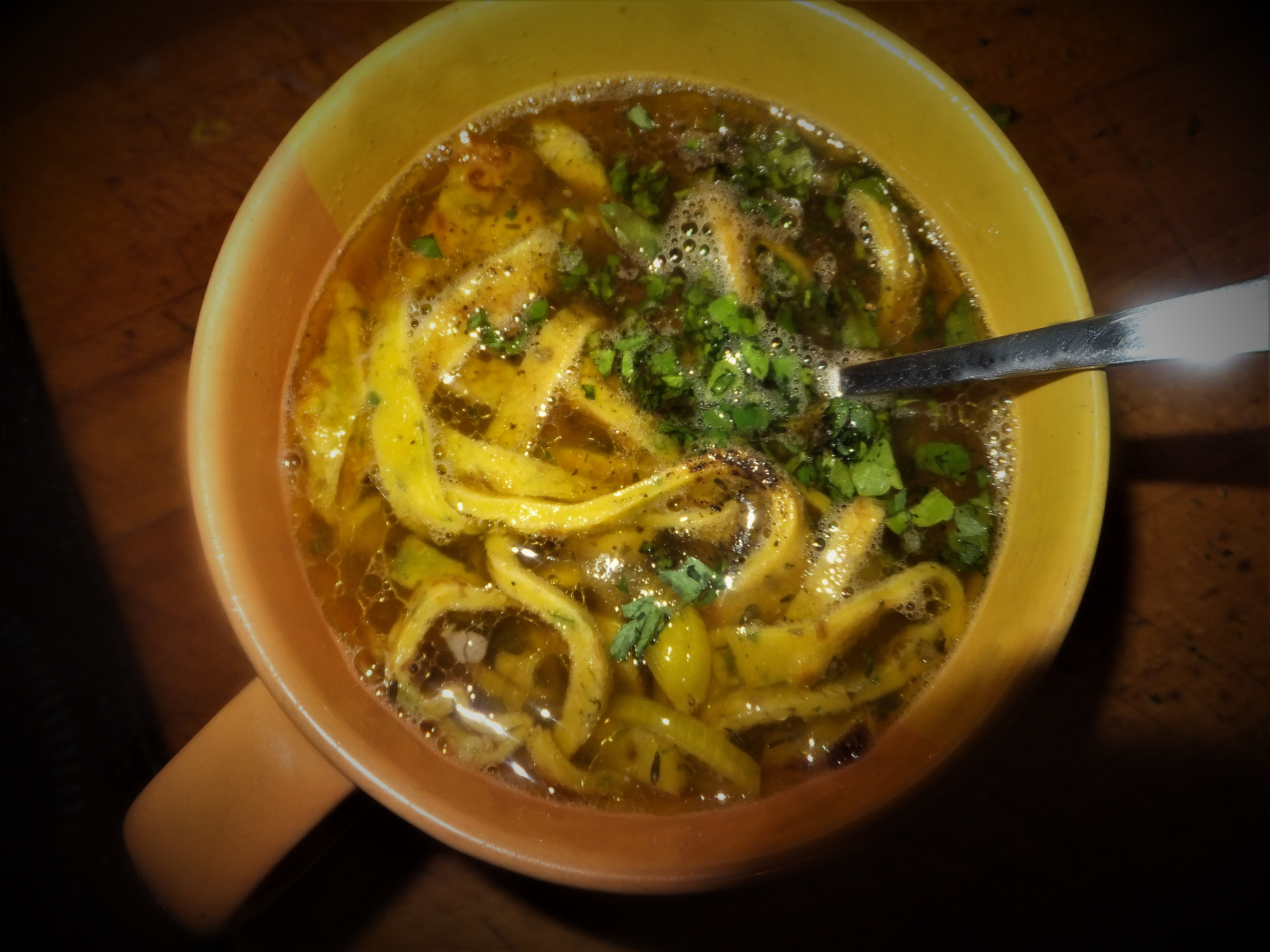 Kräuterpfannkuchensuppe